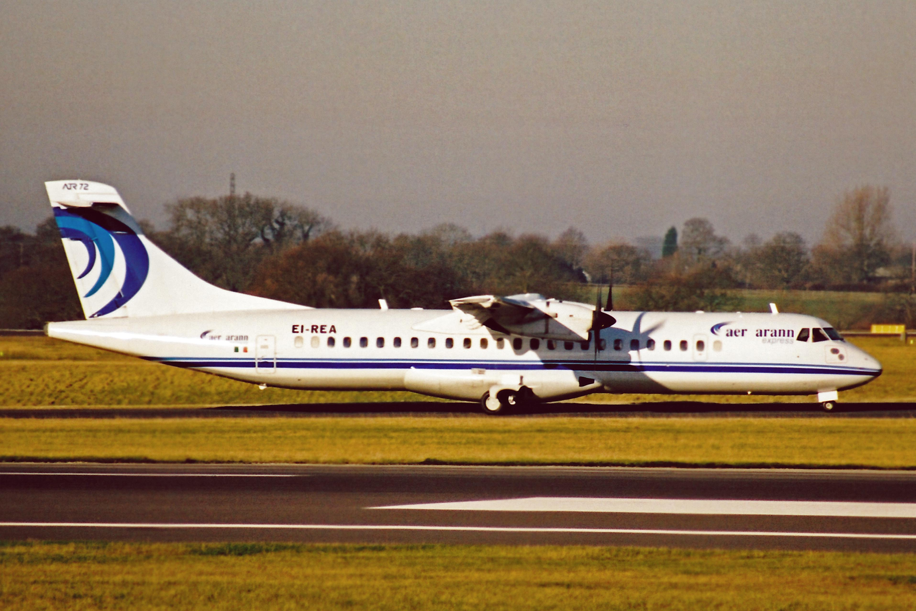 EI-REA ATR.72-202 Aer Arann Express MAN 15FEB03